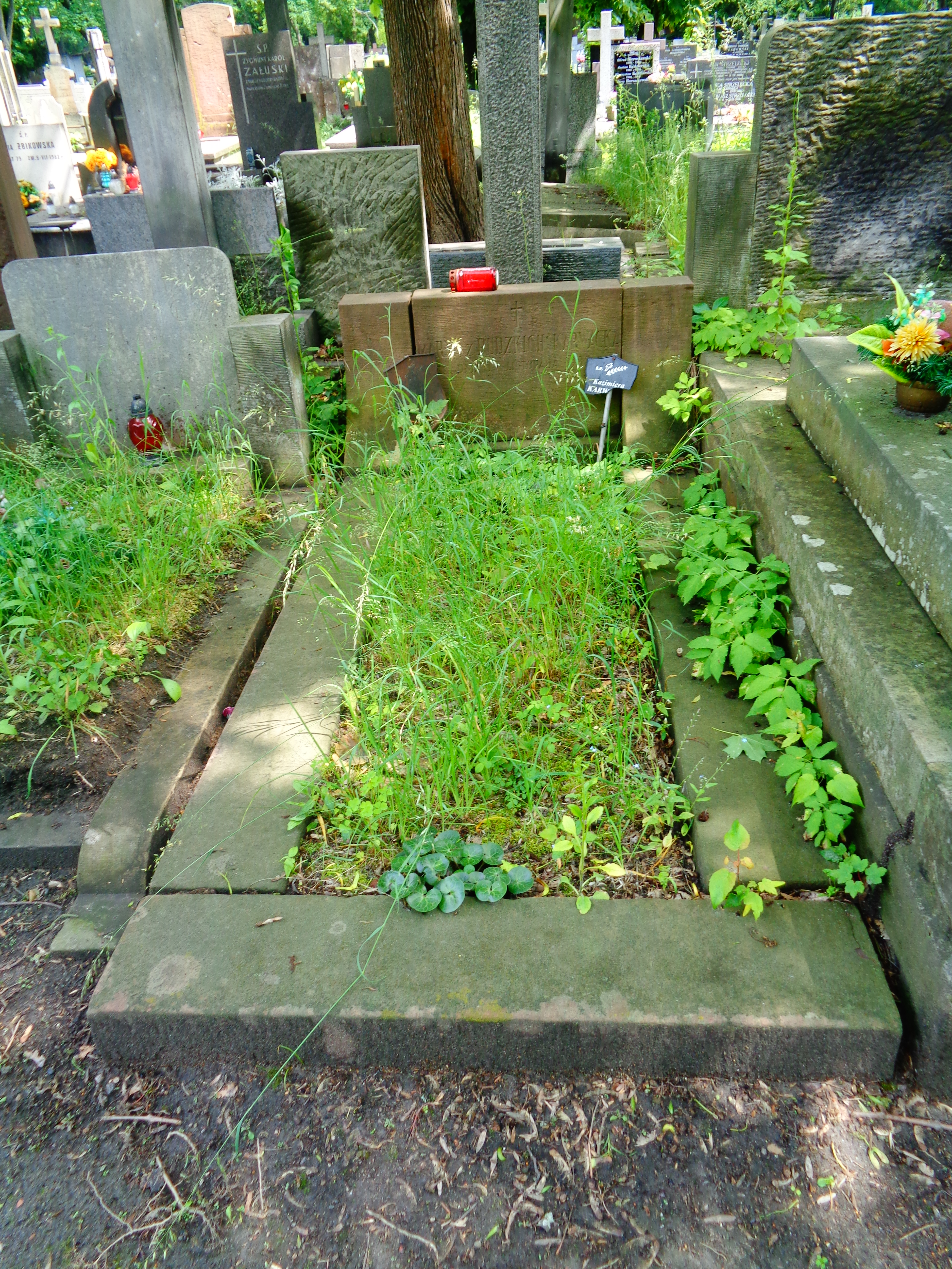 Grób Leona Karwackiego na Cmentarzu Powązkowskim